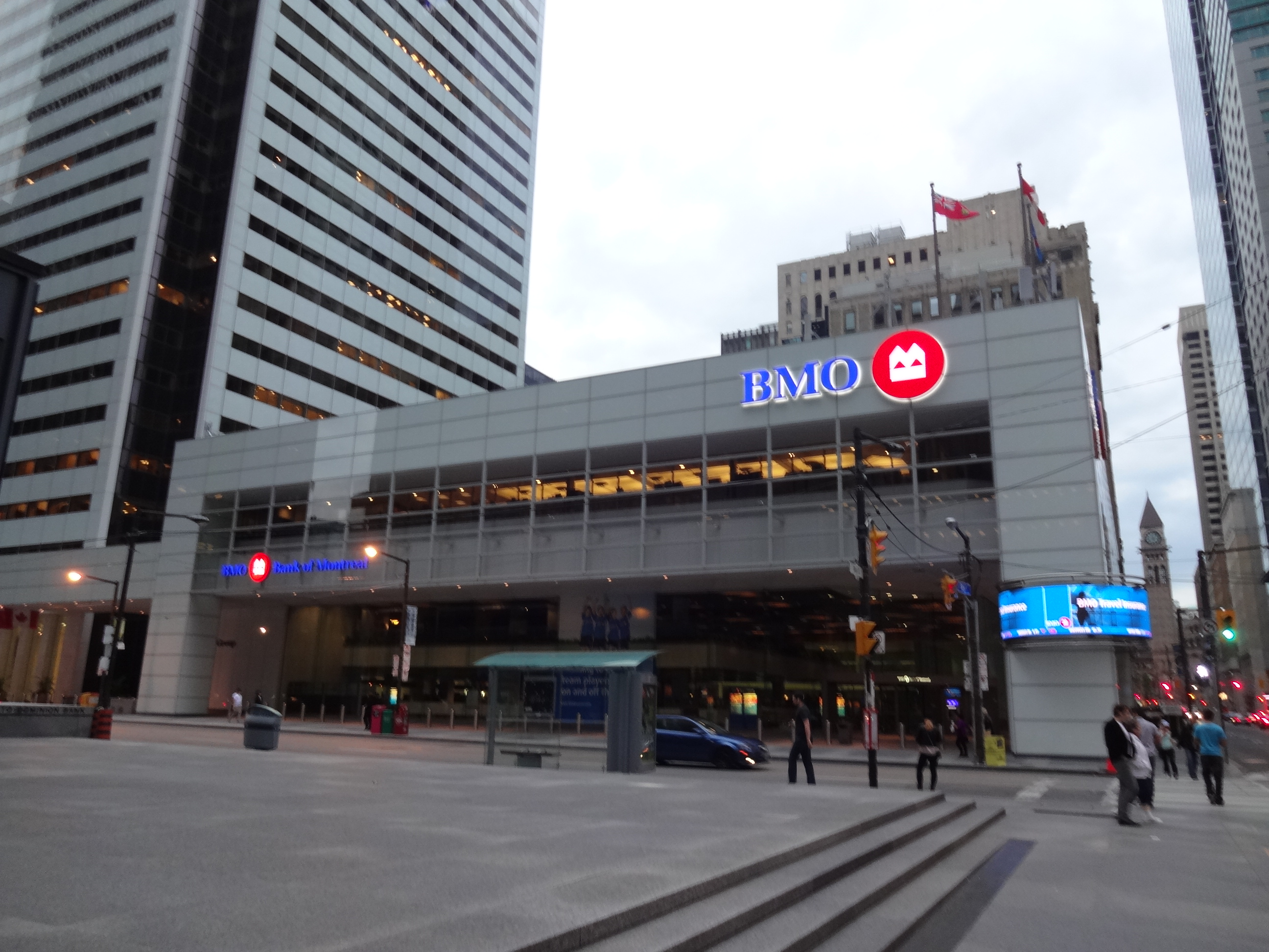 Edifício do Banco de Montreal em Toronto.